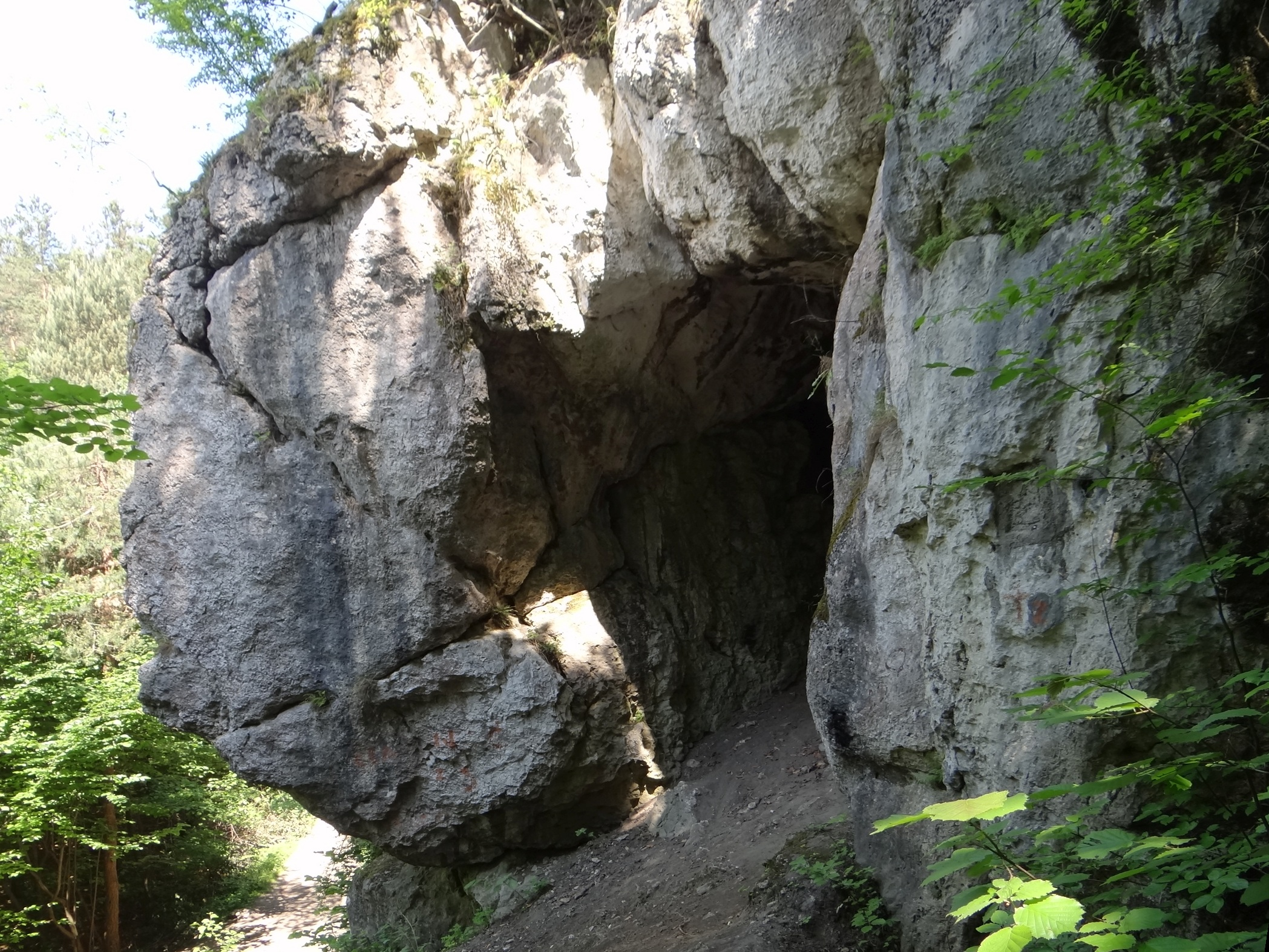 Jaskinia w Straszykowej